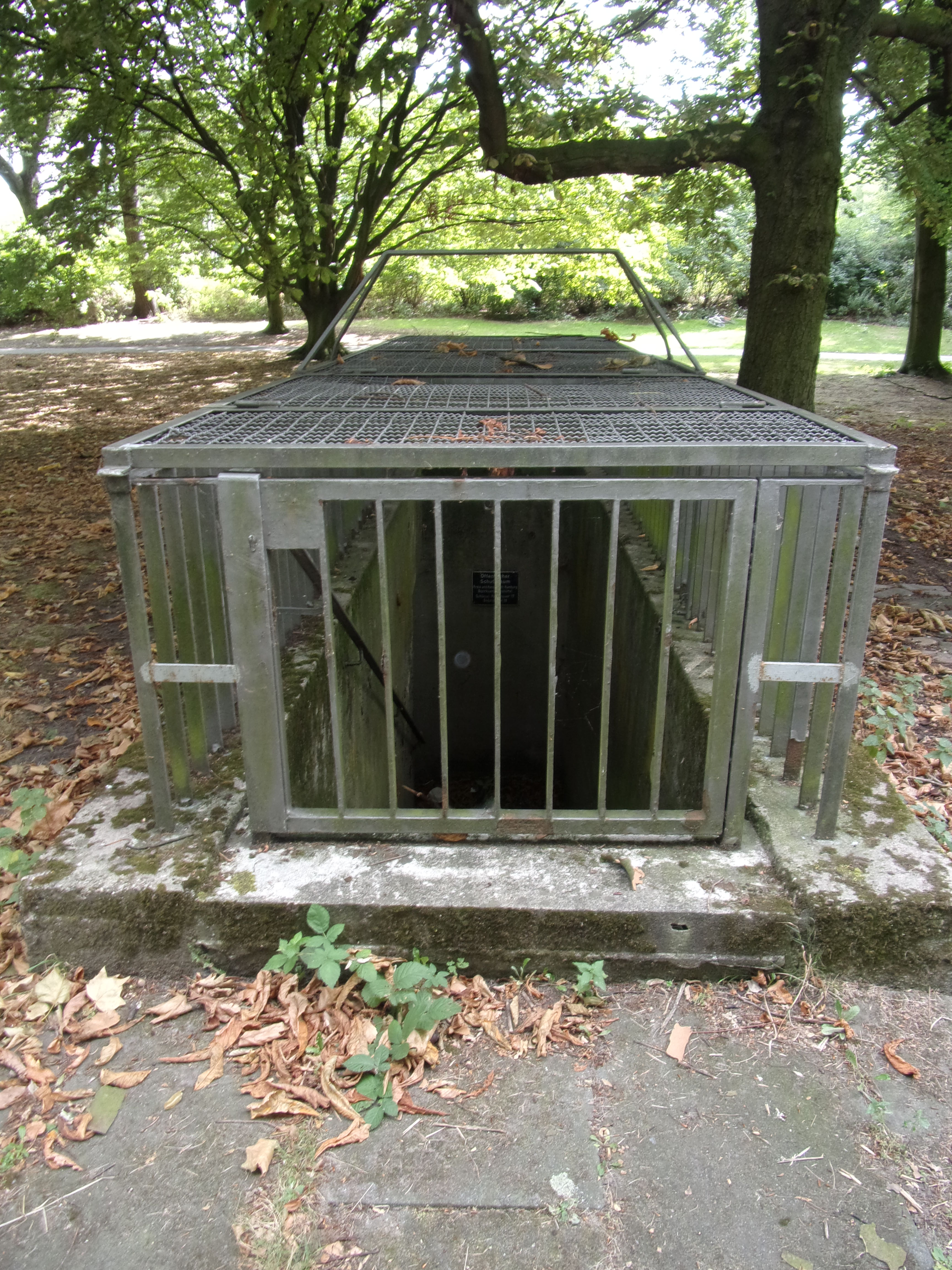 Eingang zum Schutzraum oder ehemaligen öffentlichem Schutzraum im Alsterpark zwischen Kennedy- und Lombardsbrücke.